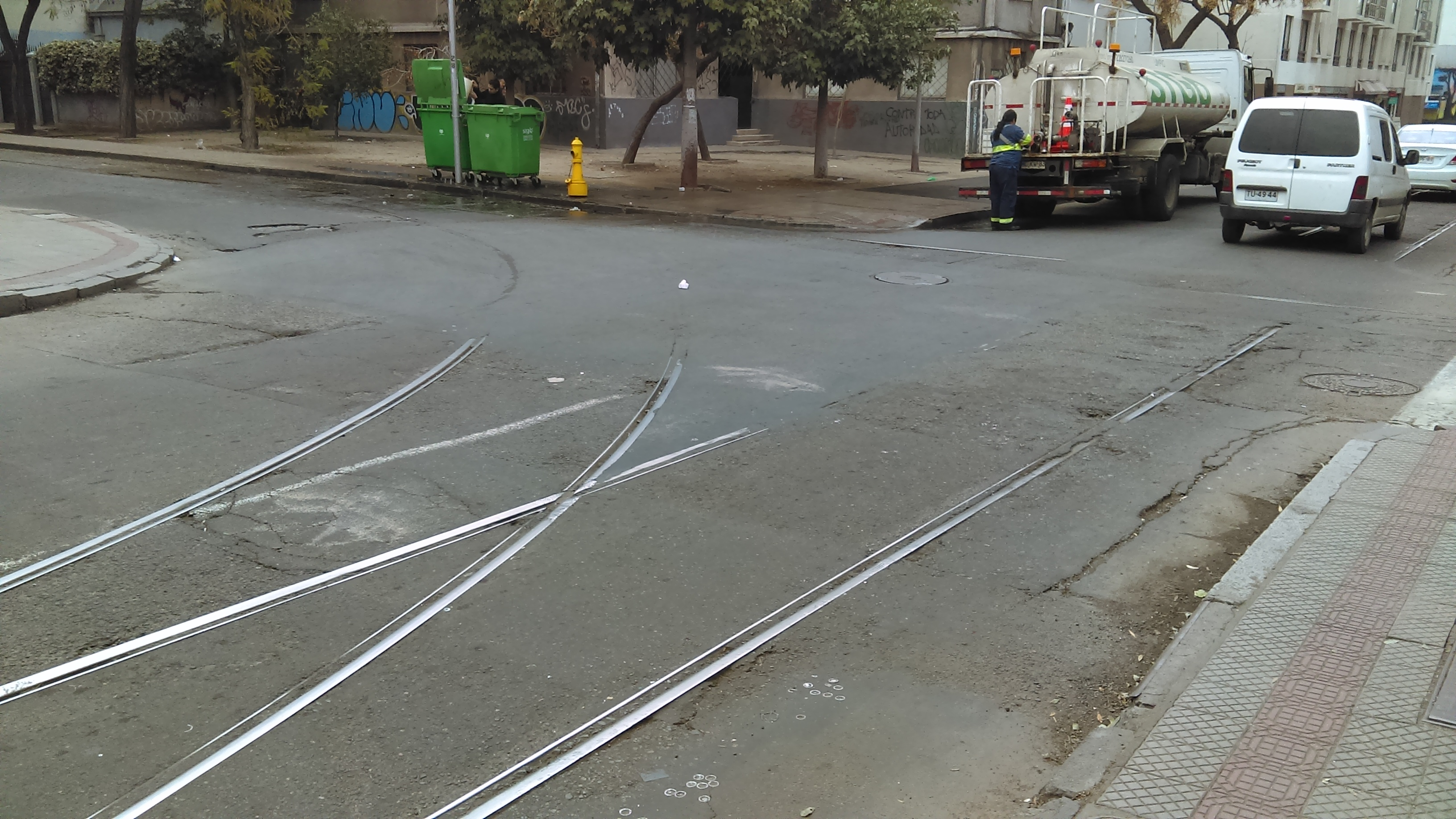 Cercanías de la estación fantasma Libertad; Barrio Yungay; además se pueden observar rieles pertenecientes al sistema de tranvías de Santiago.